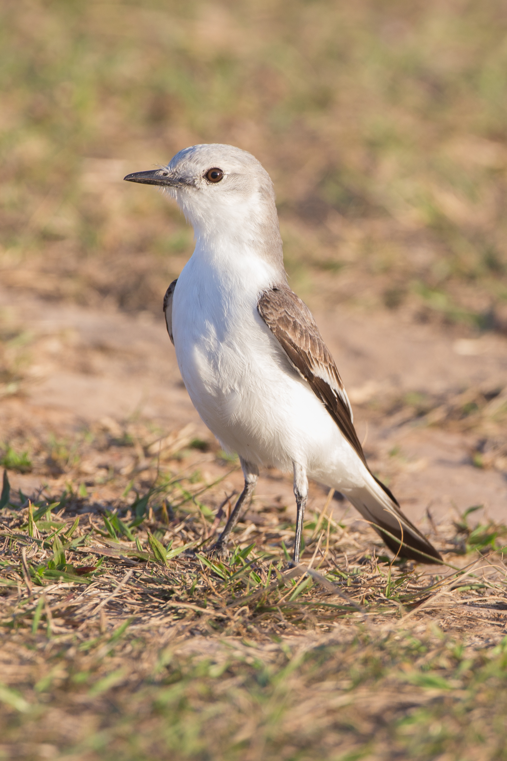 Noivinha-branca (Xolmis velatus) no Parque Nacional da Serra da Canastra